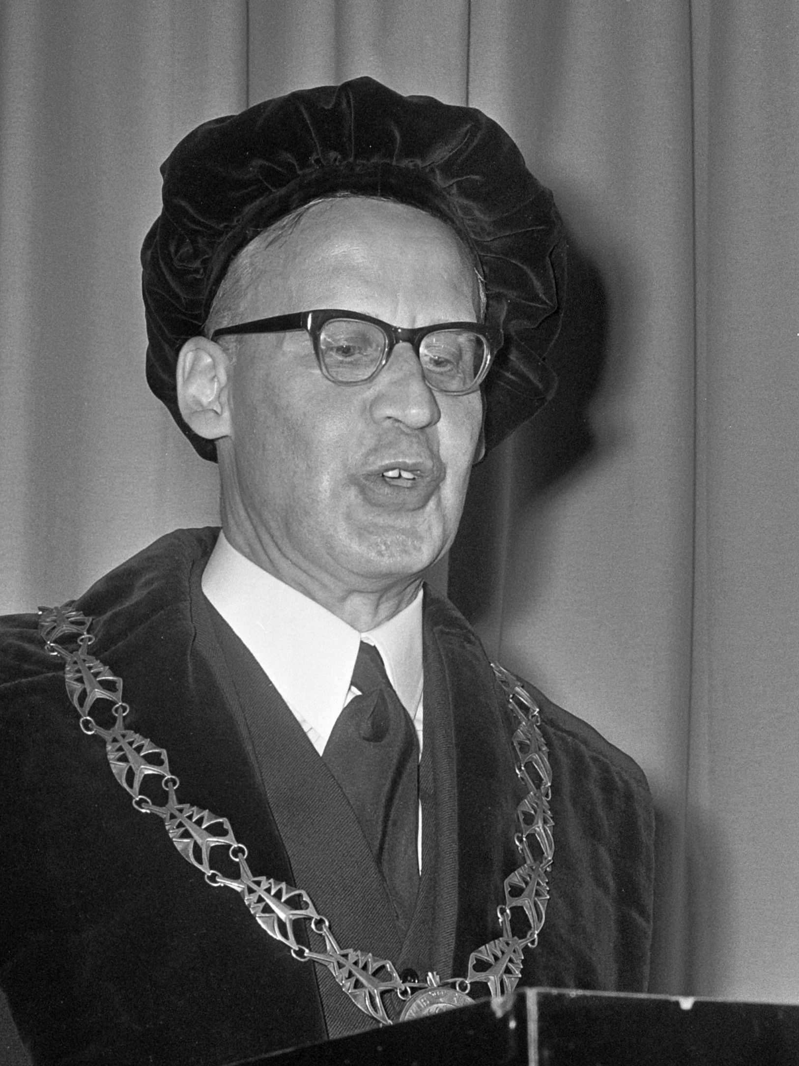 De heer I.A. Diepenhorst (ARP), rector-magnificus van de V.U. in Amsterdam. Nederland, 4 september 1972.